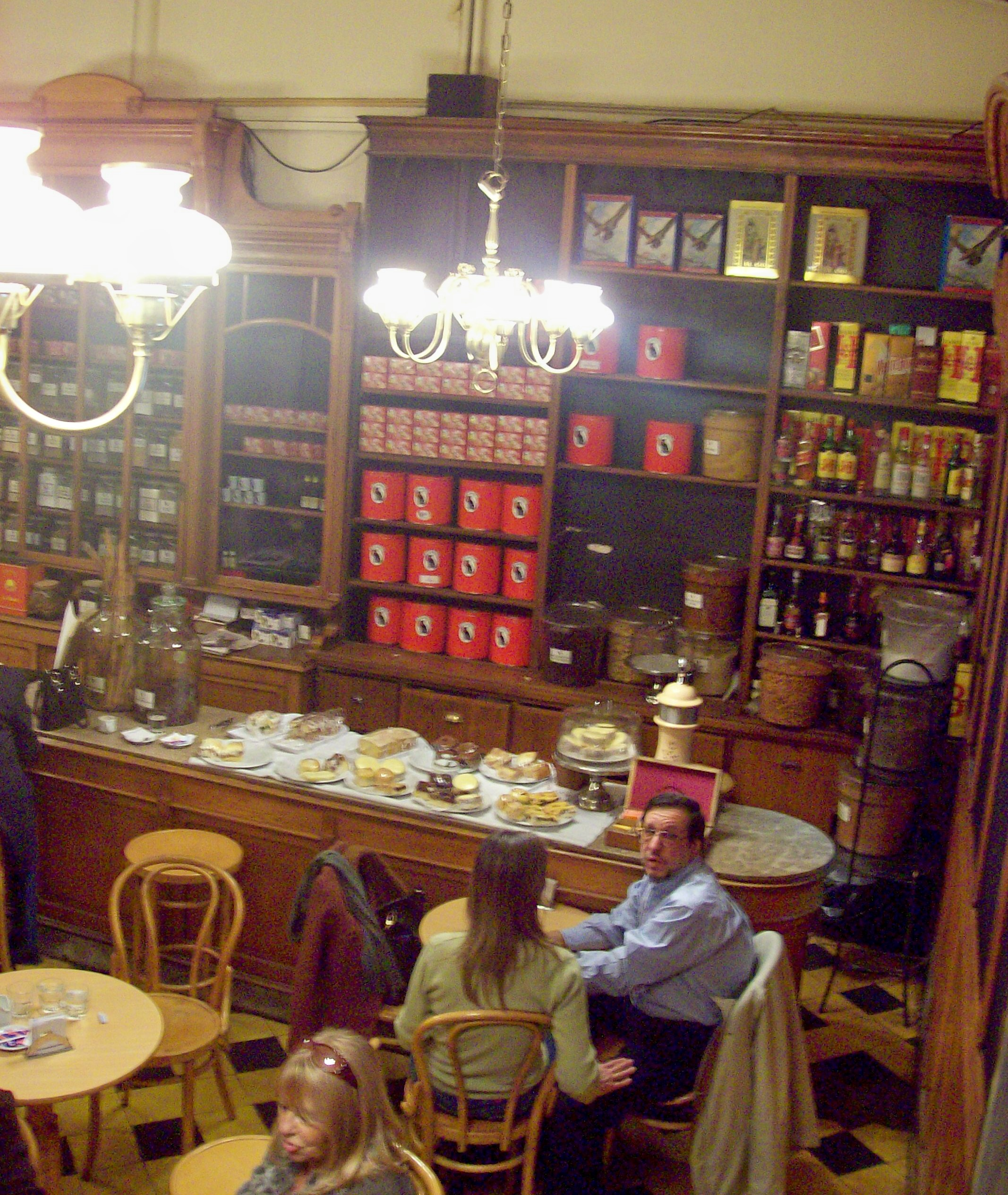 El gato negro (Corrientes 1669, barrio San Nicolás, Buenos Aires, Argentina) es un bar donde se puede disfrutar de gran variedad de estilos de infusiones. Es una de las especierías más antigua de la ciudad de Buenos Aires (creada en 1927). Tiene un amplio salón en el primer piso. También hay shows de tango, jazz y música melódica.